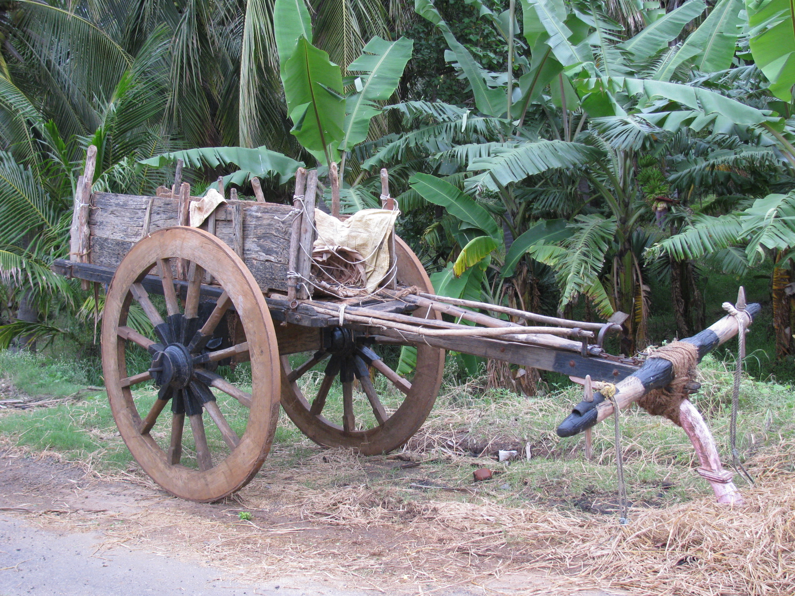 தமிழனின் இருச் சக்கர வாகனம்